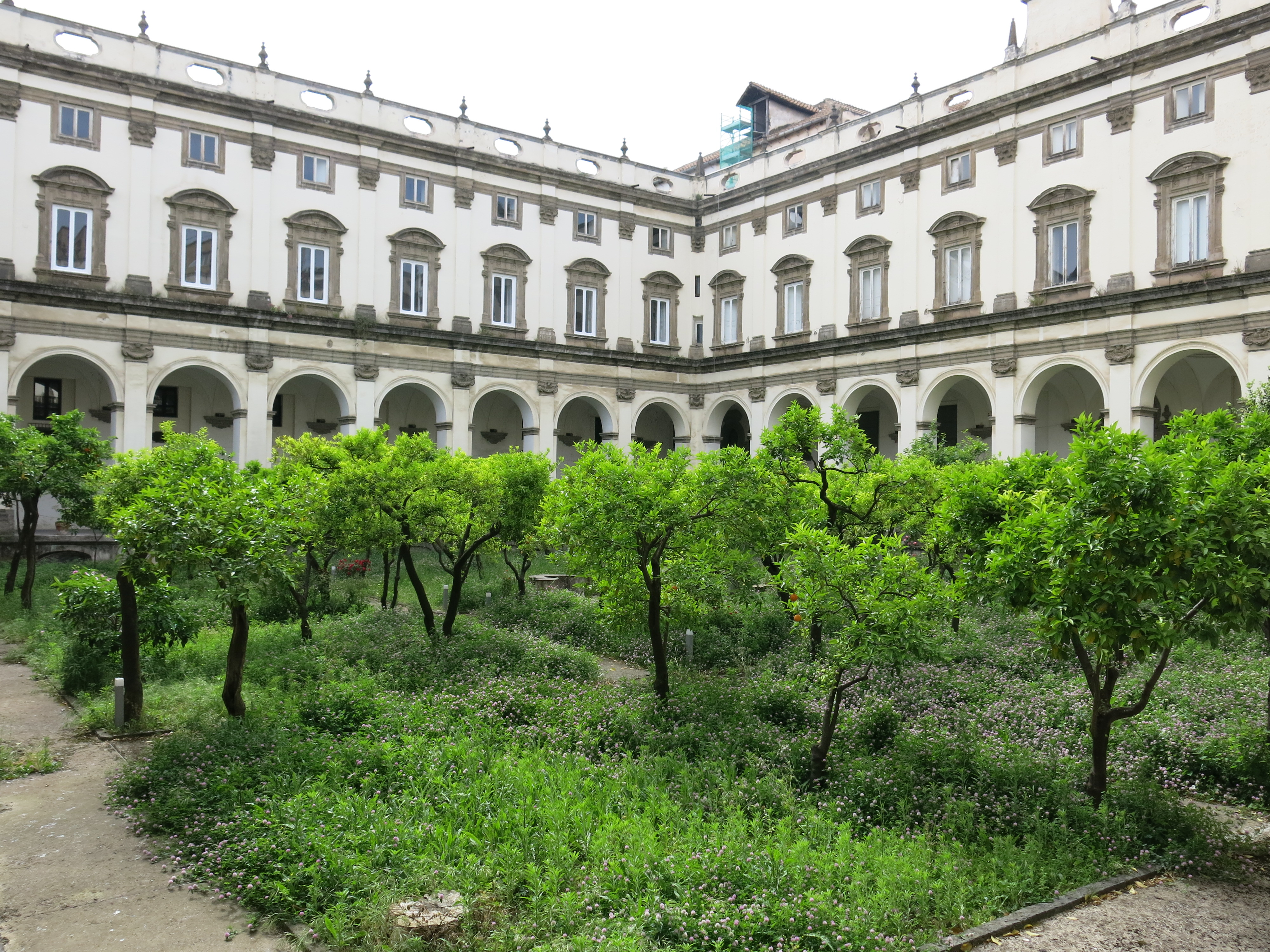 Le chiese di Napoli